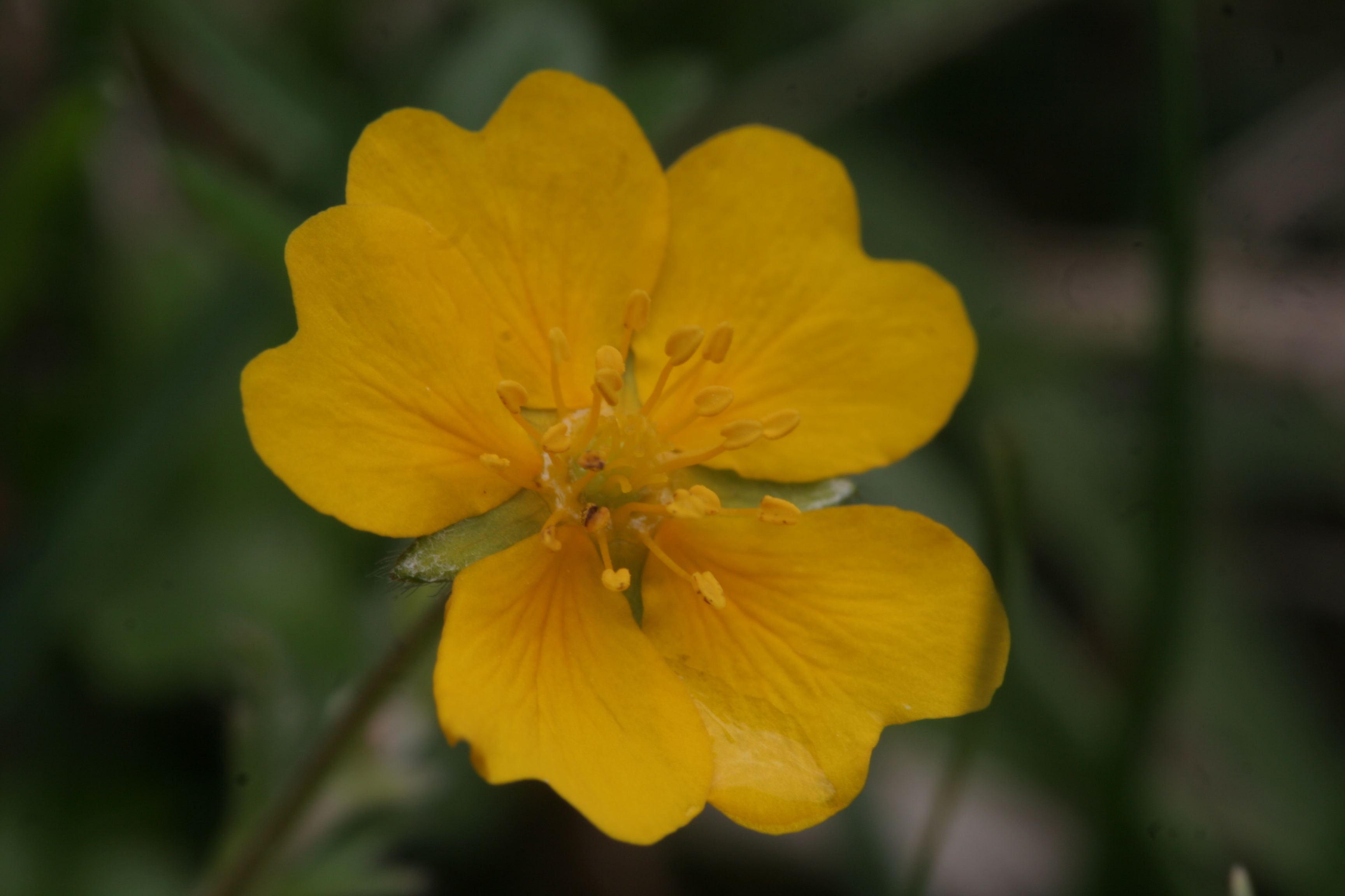 Potentilla_crantzii (Cinquefoglia di Crantz) Loc. Passo Duran (baita Casen), Agordo (BL) , quota 1316 m s.l.m.